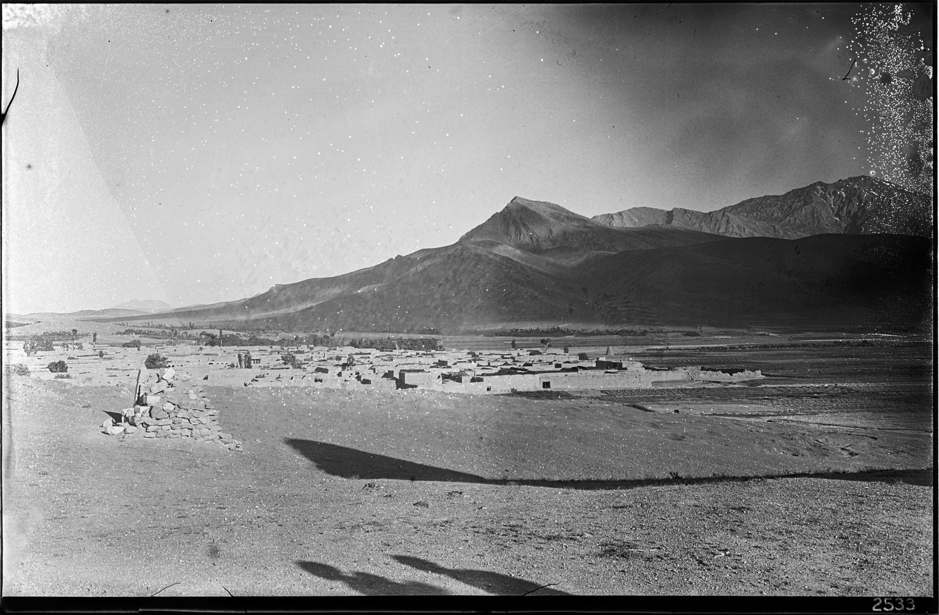 تۆرکجه: سونقورون شکیلی 1923 جی میلادی ایل ده